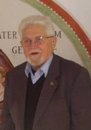 Игорь Сендлер